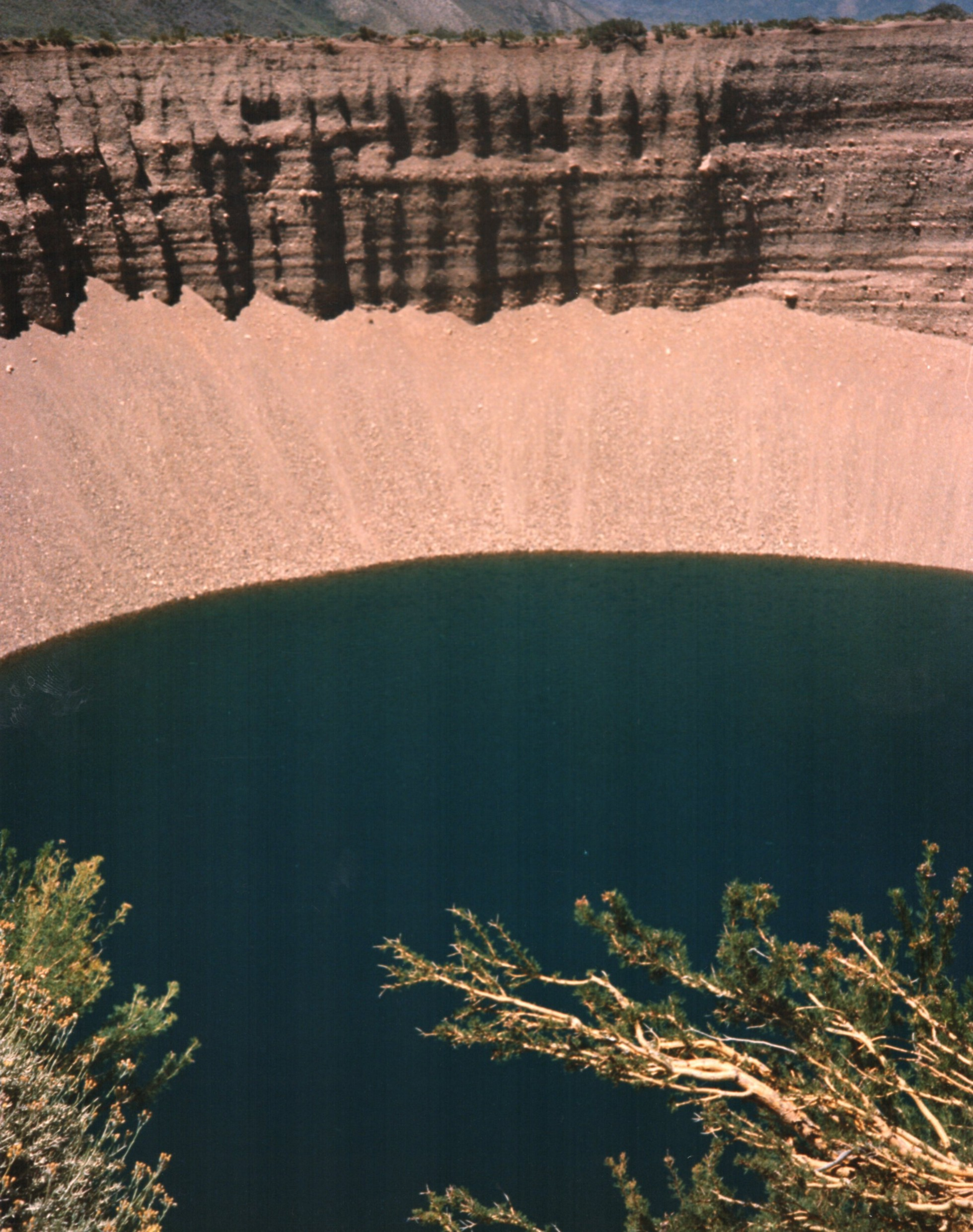 Vista parcial del espejo de agua contenido en el interior del Pozo de las Ánimas (que en realidad son dos pozos, uno al lado del otro, la imagen es del más grande). Se sitúa en la provincia de Mendoza, en el camino que conduce al Valle de Las Leñas.